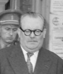 Mijnramp Bois du Caizier, Marcinelle in België. (...) minister Van Acker